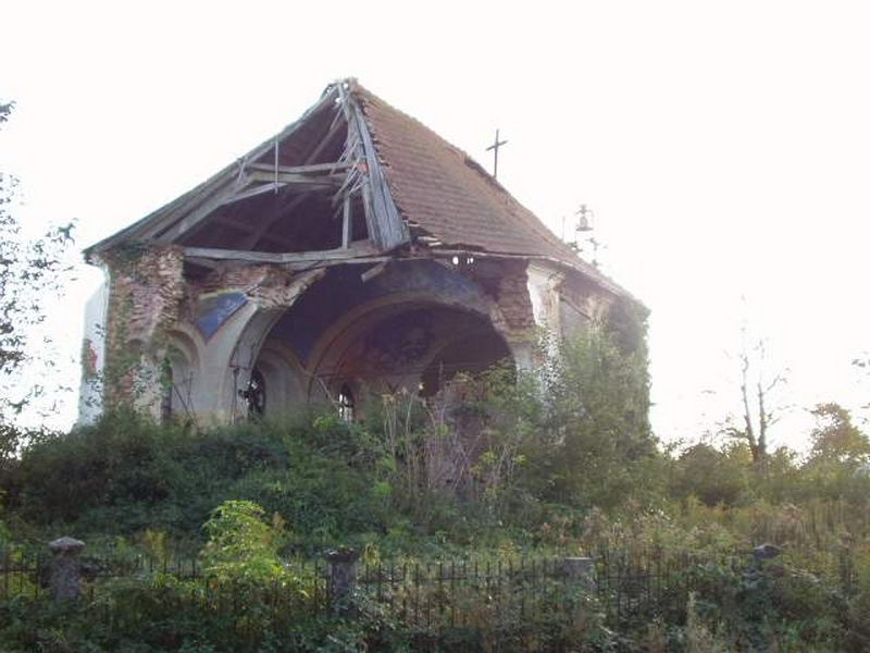 Donji Lipovčani - Church in Ruins